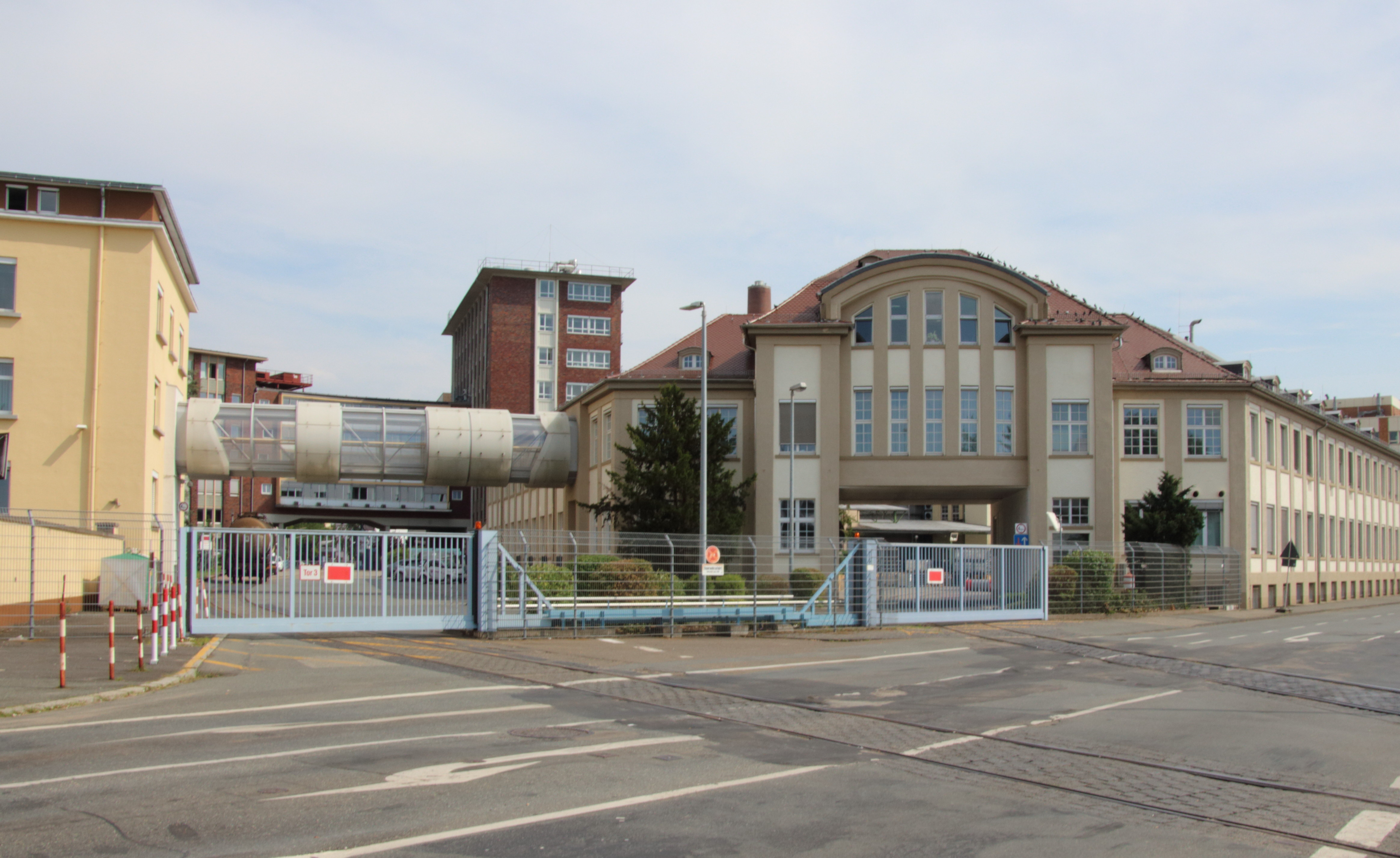 Werksgebäude mit Portal von Röhm & Haas, ab 1971 Röhm GmbH, heute Evonik Industries. Kirschenallee, Darmstadt, Hessen. Das in Esslingen gegründete Unternehmen Röhm & Haas zog am 22. Juli 1909 nach Darmstadt. Der Erweiterungsbau mit dem Portal des Architekten Karl Klee an der Kirschenallee stammt von 1916. Das denkmalgeschützte Eckgebäude war über viele Jahre die Hauptpforte des Unternehmens.